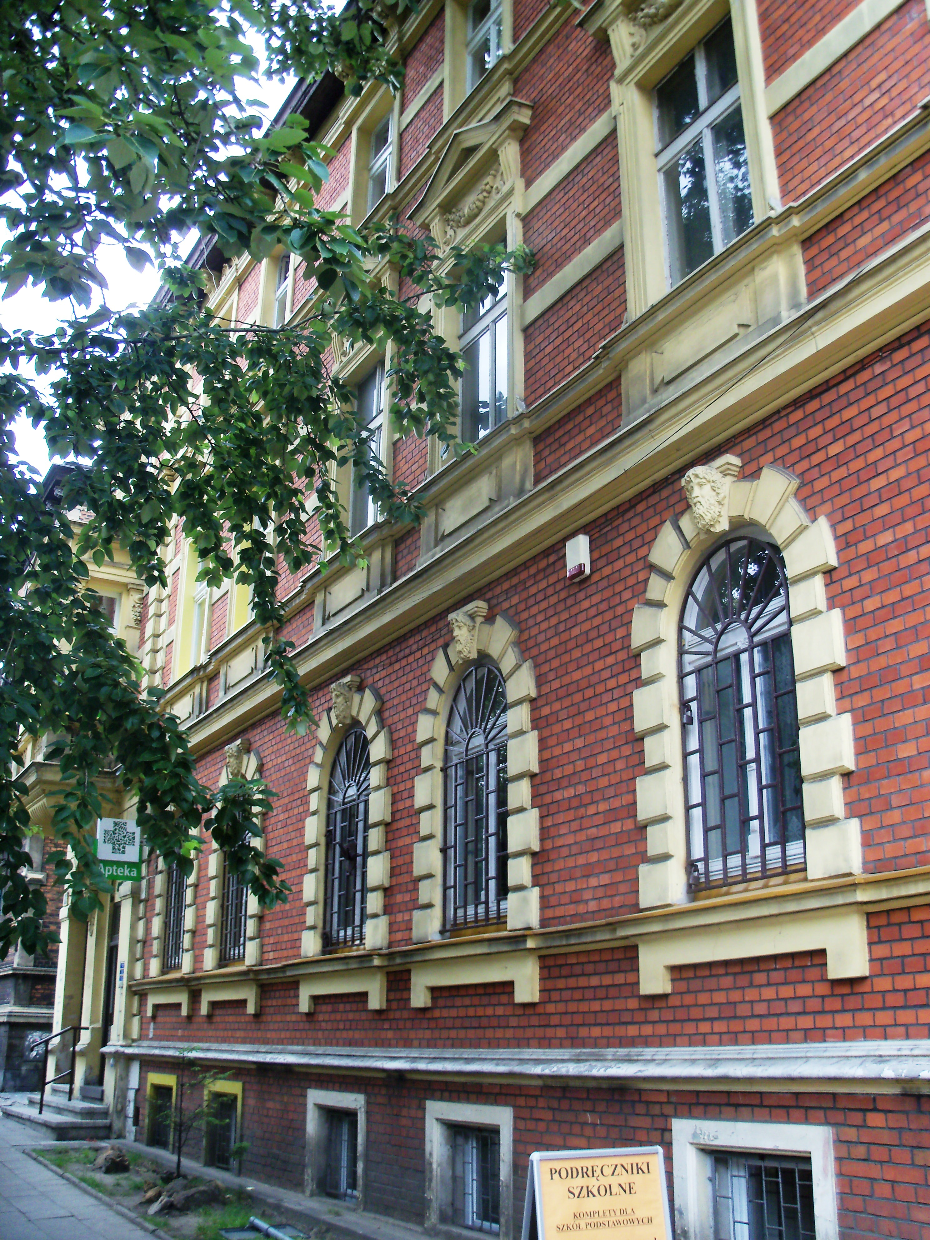 Katowice-Szopienice: ulica ks. bpa Herberta Bednorza - budynek pod numerem 14